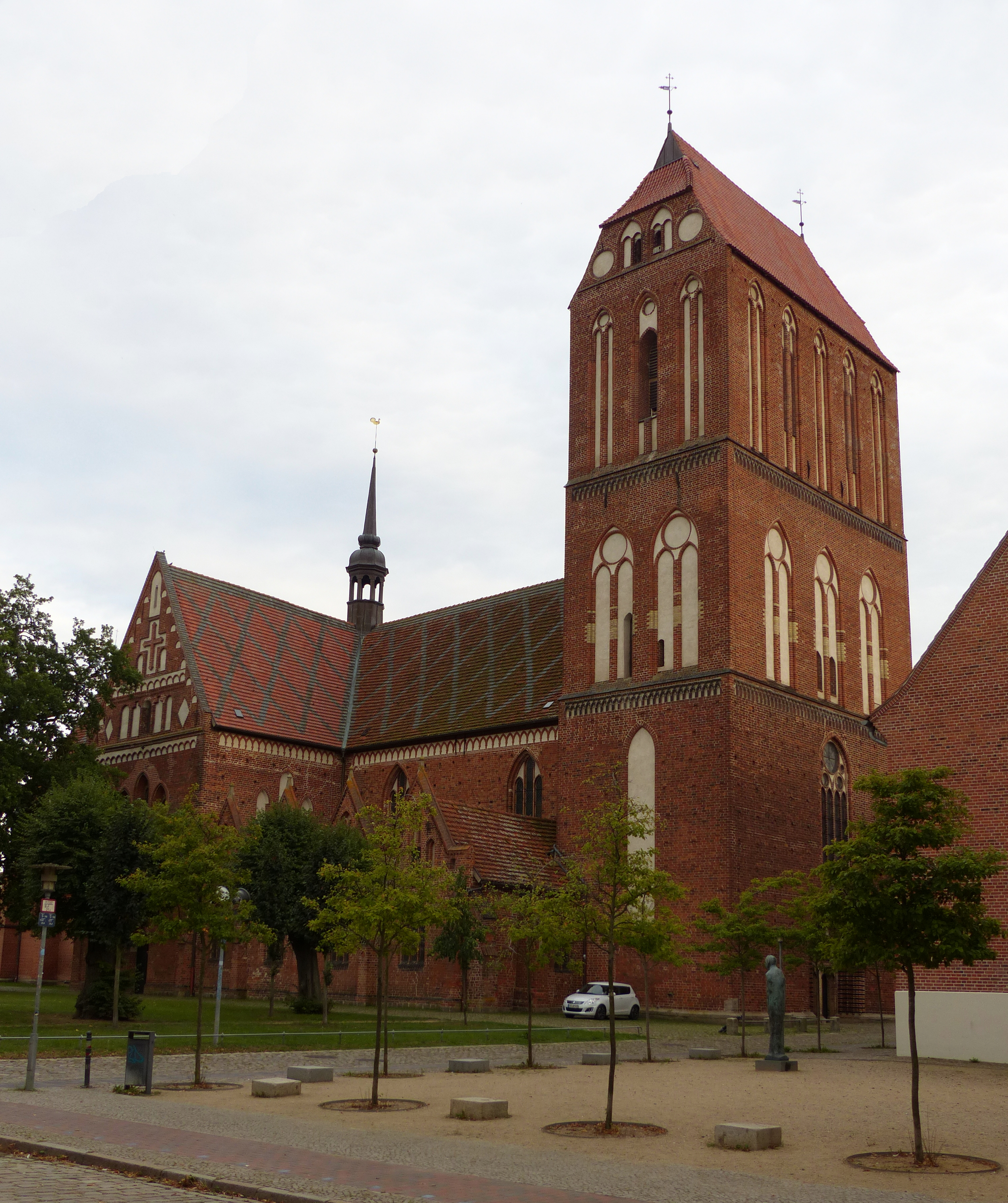 Güstrower Dom von NW